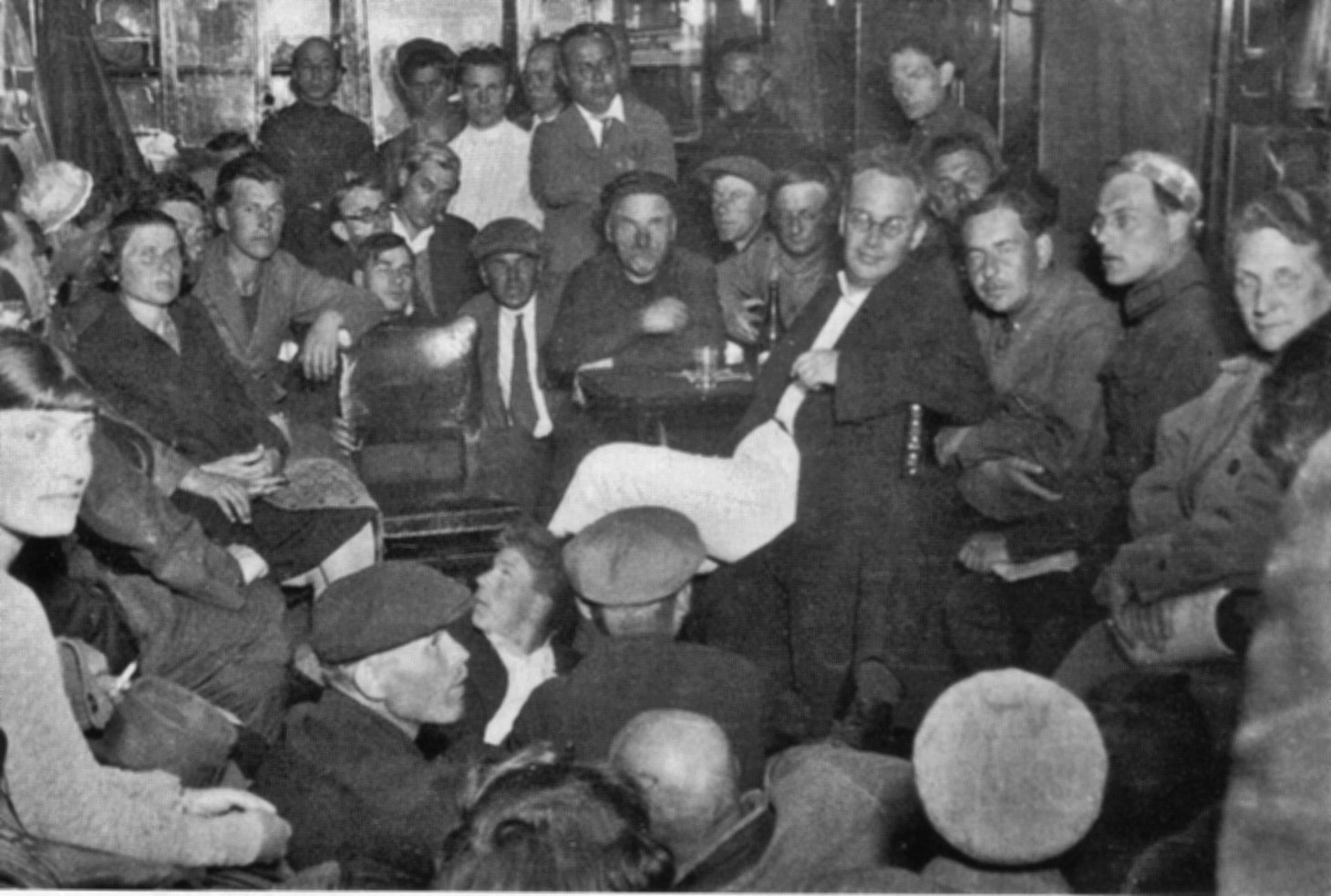 На электрозаводе "Самоточка". Сейчас Ильф и Петров будут читать отрывки из романа "Золотой теленок". 1931 г.